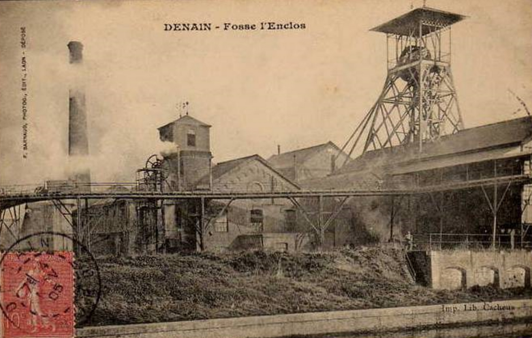 Fosse Enclos de la Compagnie des mines d'Anzin, Denain, Nord, Nord-Pas-de-Calais, France.